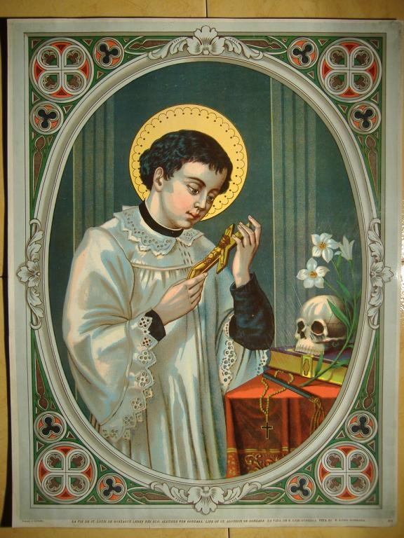 Św. Alojzy (1568-1591)